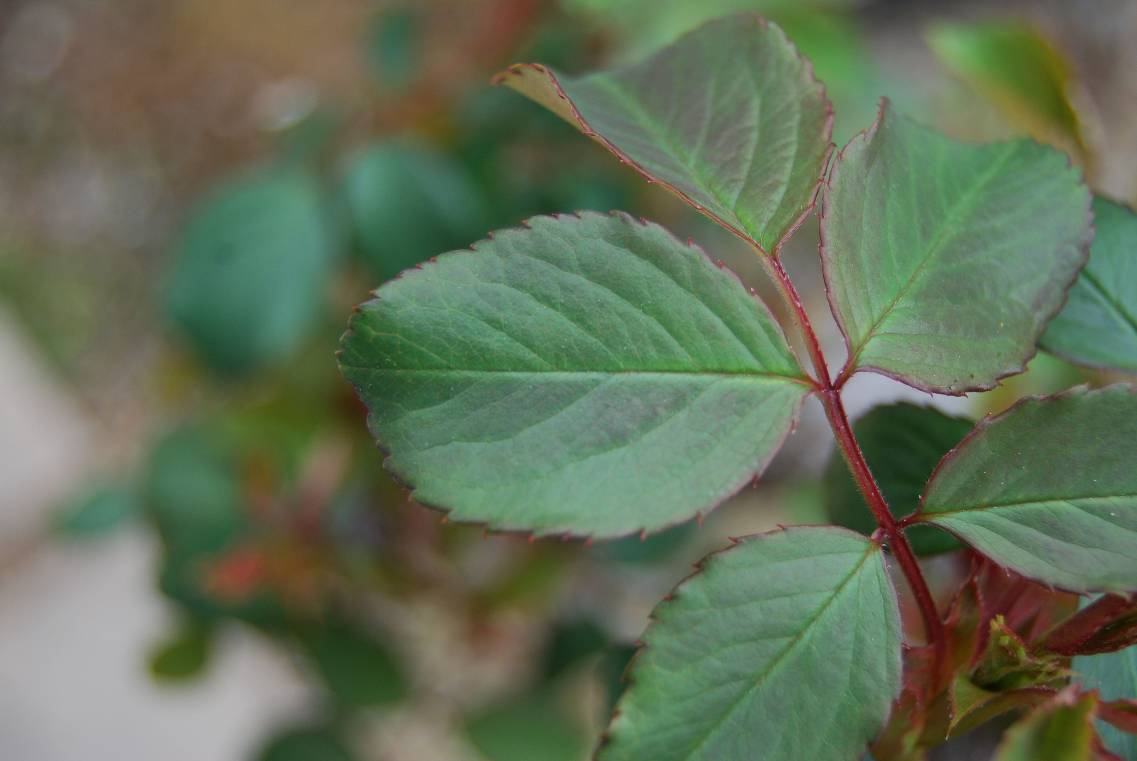 Rose Leaflets